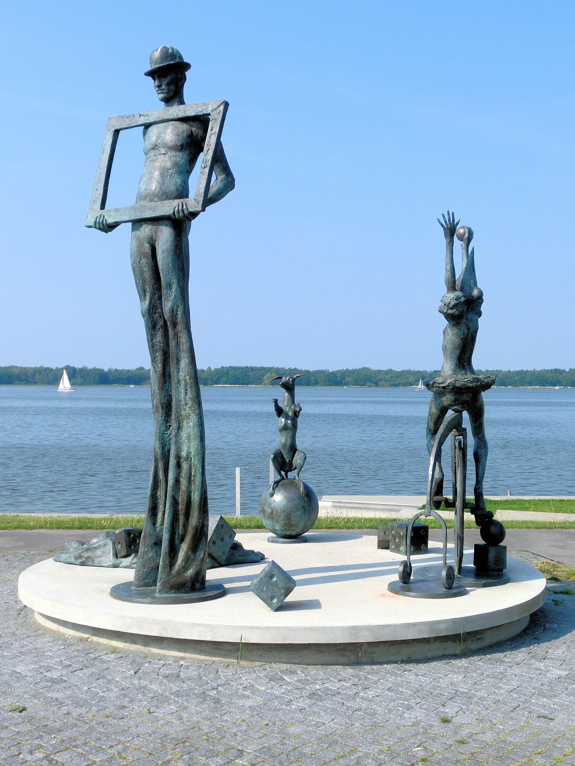 Figurengruppe "Der Zirkus kommt" von Jo Jastram in Ribnitz-Damgarten